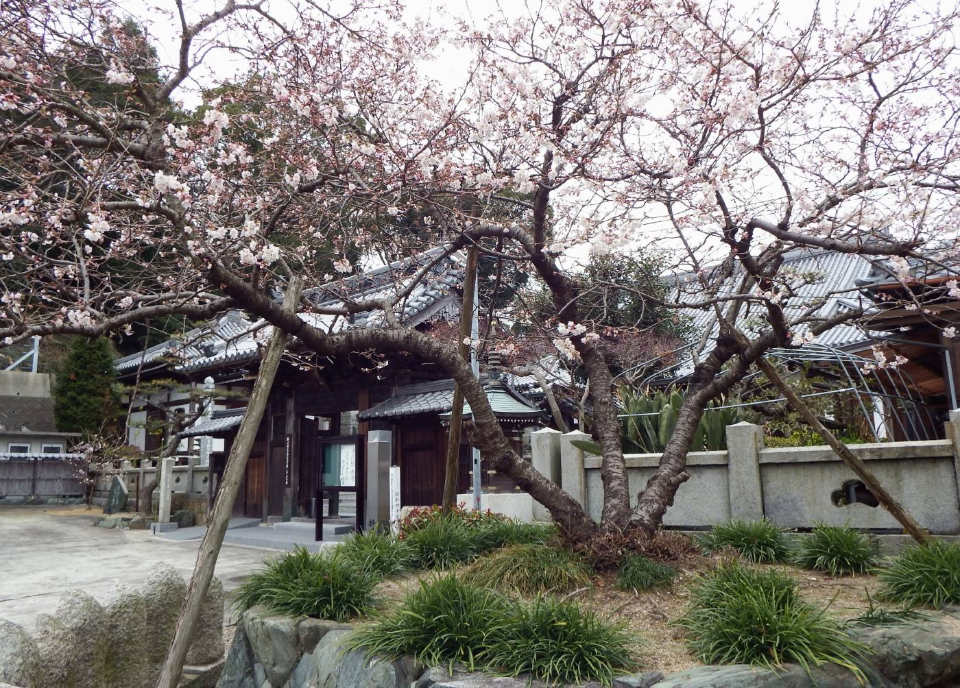 明正寺の桜